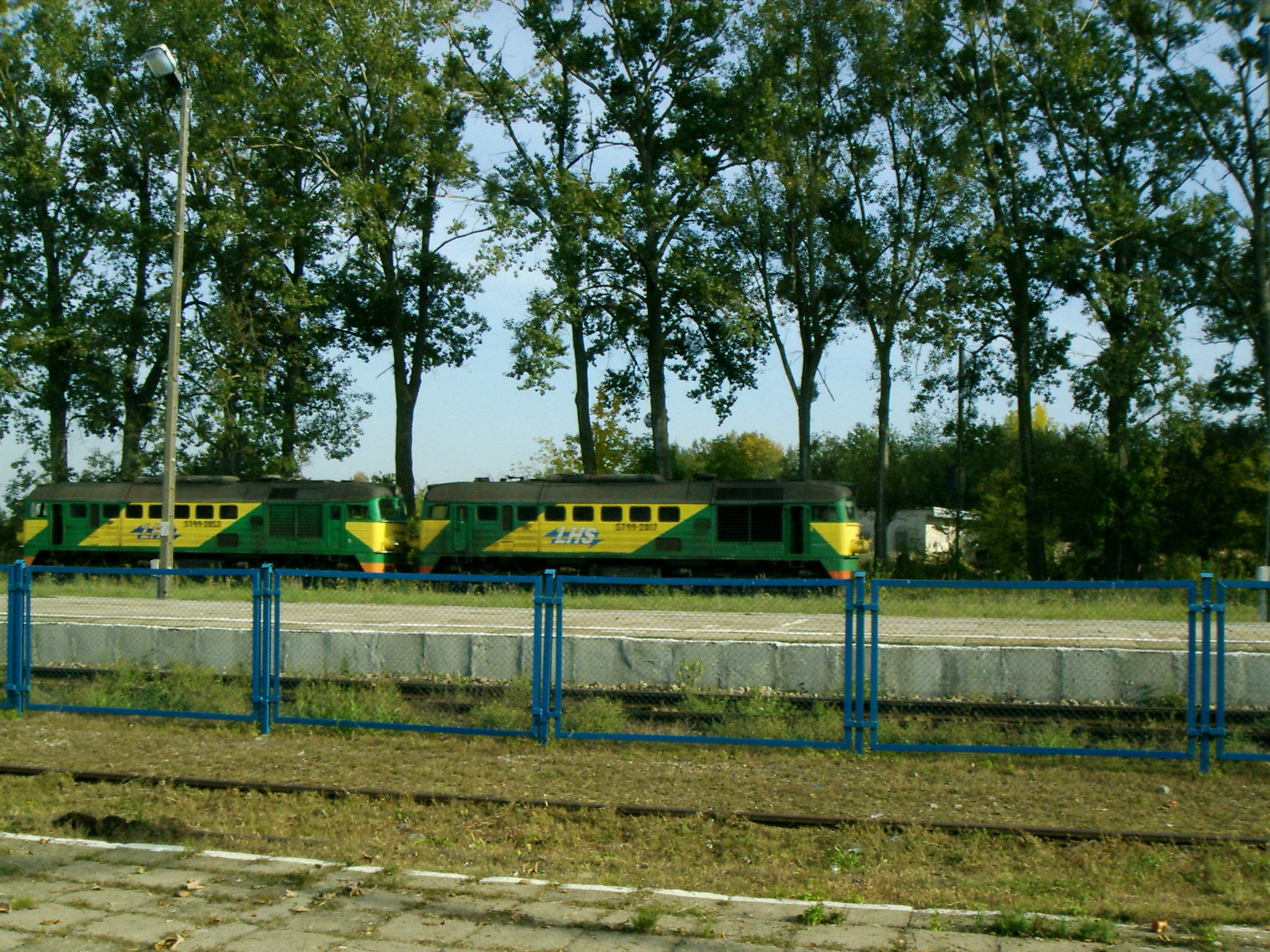 Zawada (powiat zamojski)